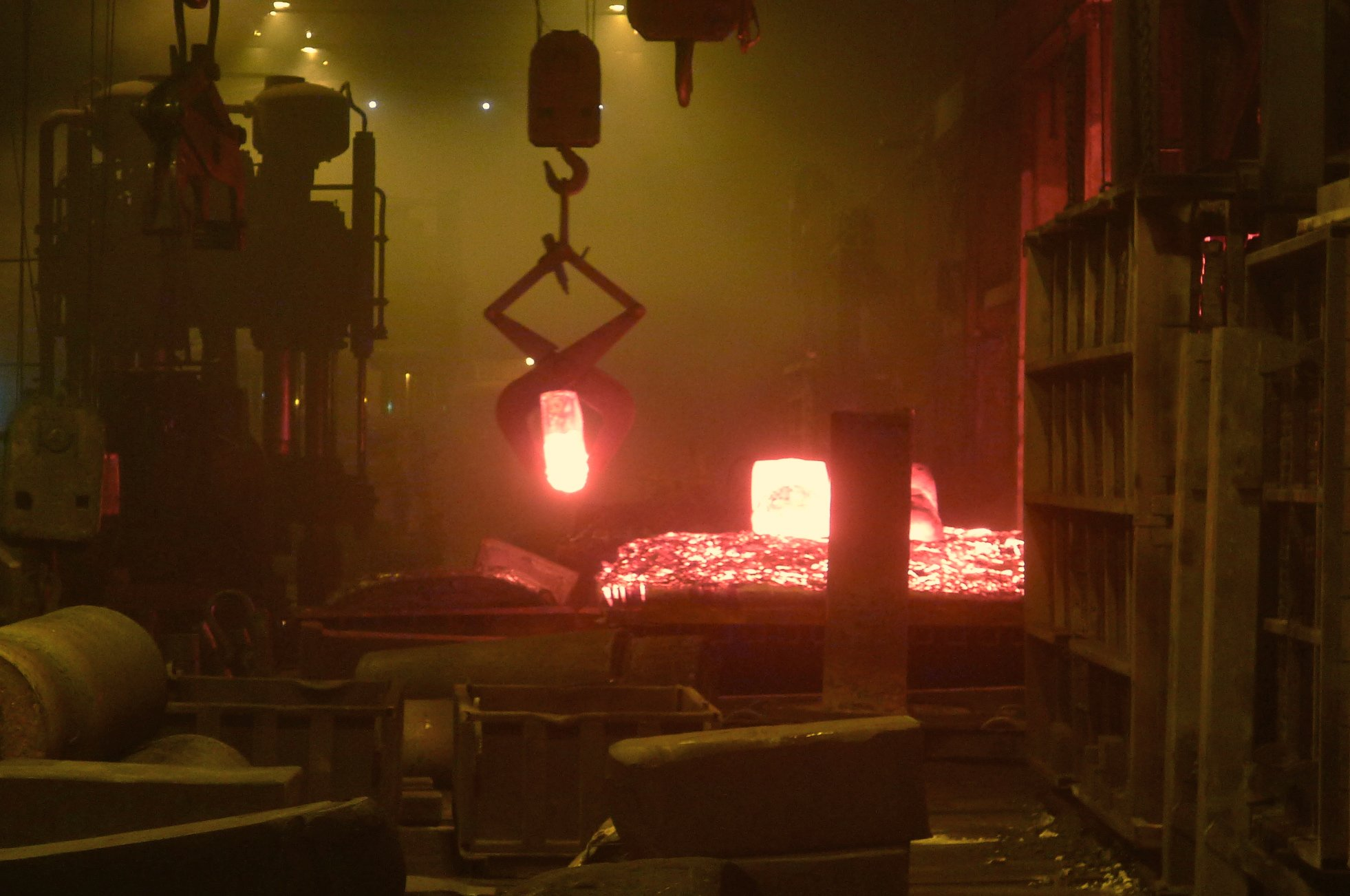 Finkl